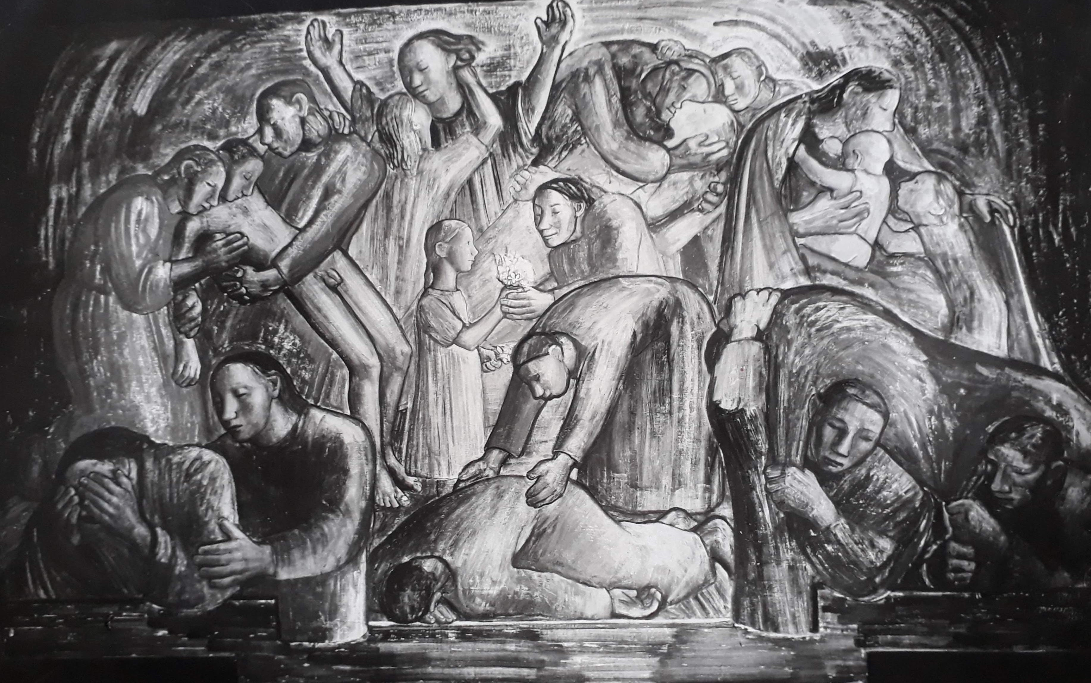 Foto af Fresko i farver , udført i kunstnerenes hjem, ødelagt under 2. Verdenskrig